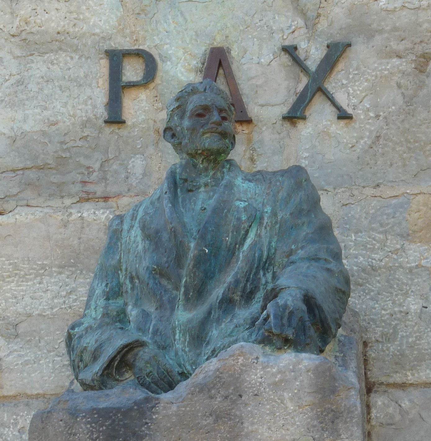 Zaragoza - Monumento a Basilio Paraíso en el Parque Grande (1910) por Miguel y Luciano Oslé